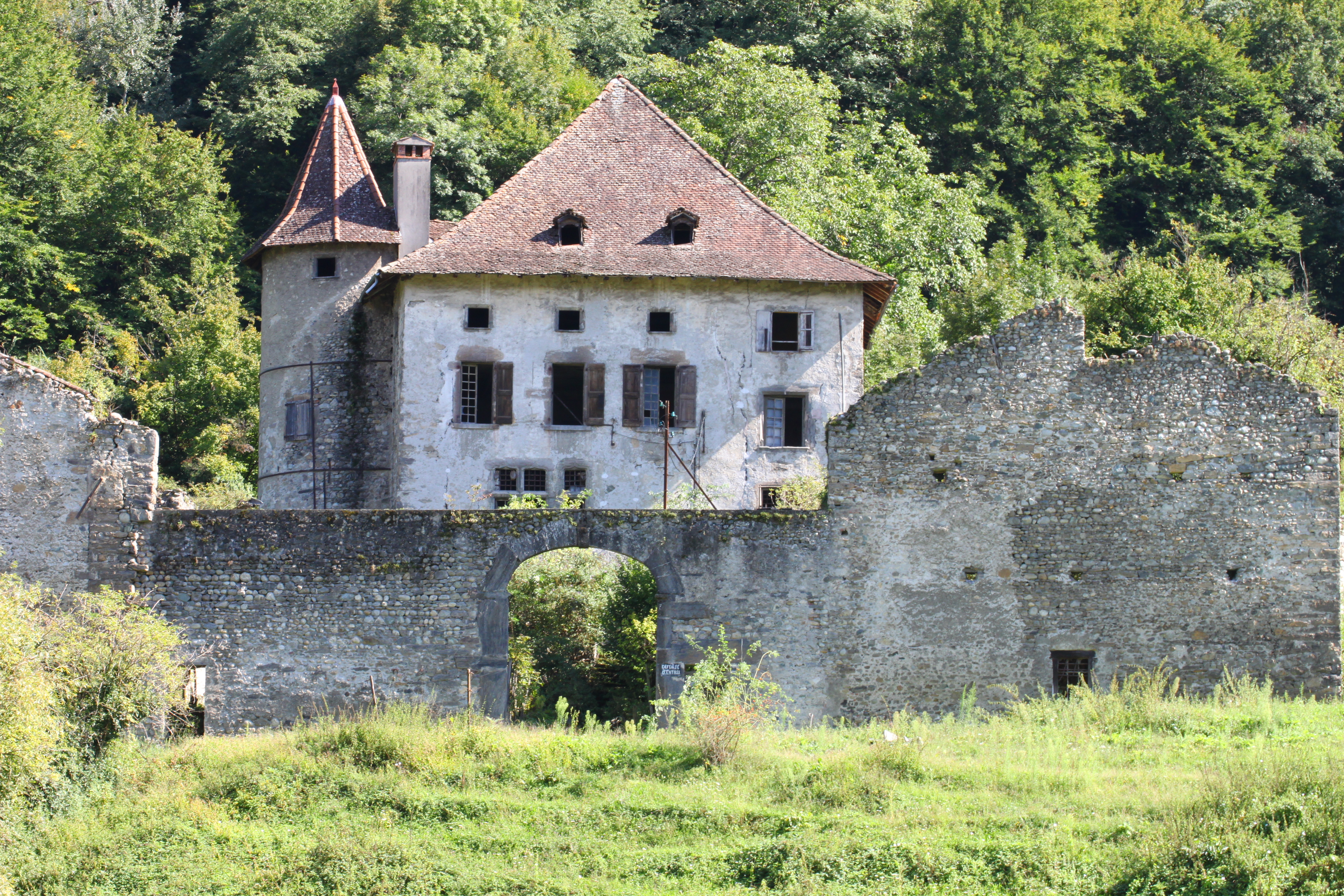 Le manoir de la Veaubeaunnais à La Pierre (Isère)